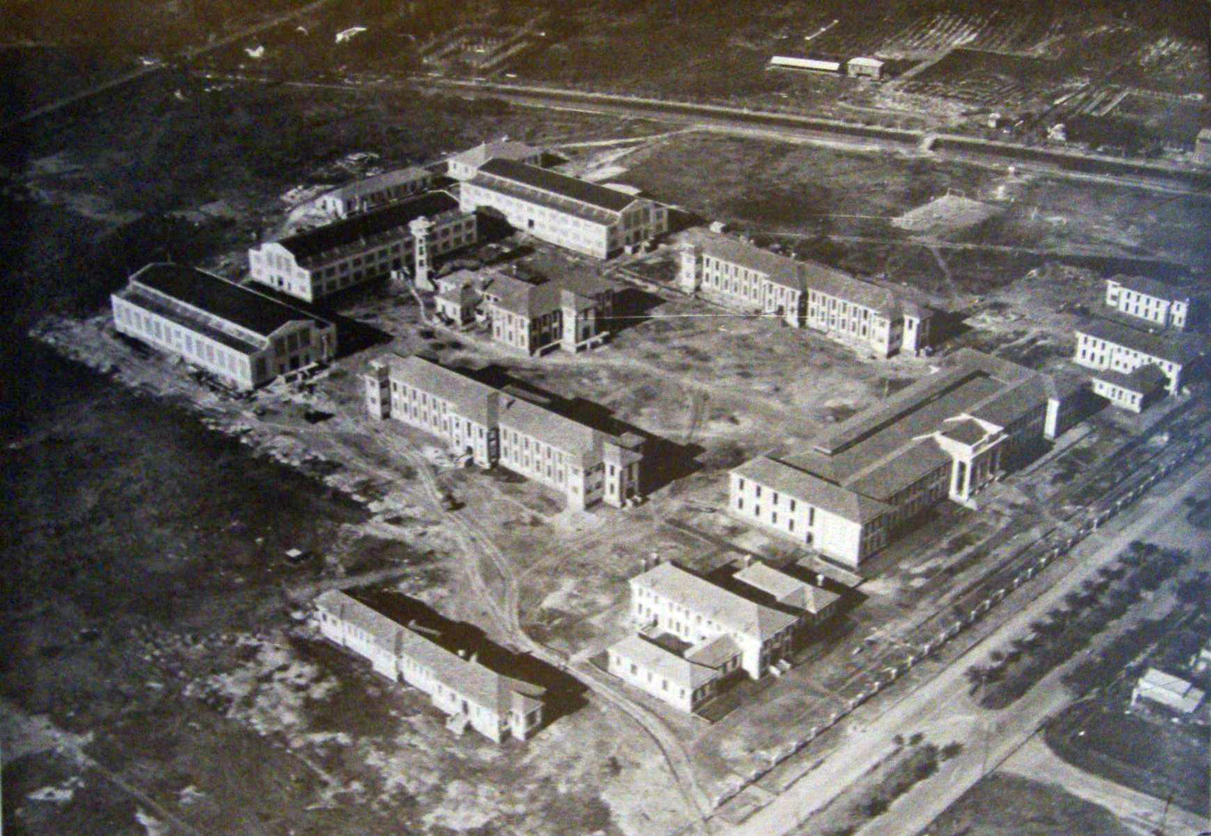 Vista aérea del complejo de la Escuela de Mecánica de la Armada, aún en construcción hacia Junio de 1928. Barrio de Núñez, Buenos Aires, Argentina.